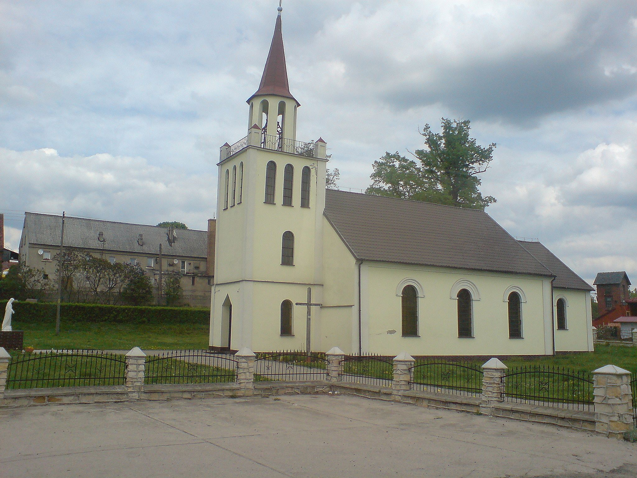 Różyniec - kościół rzymskokatolicki p.w. MB Bolesnej